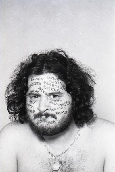 Billy Bond posando para el arte de tapa del álbum Billy Bond y La Pesada del Rock and Roll. Su cara está escrita con los nombres de los músicos que participaron en el disco.